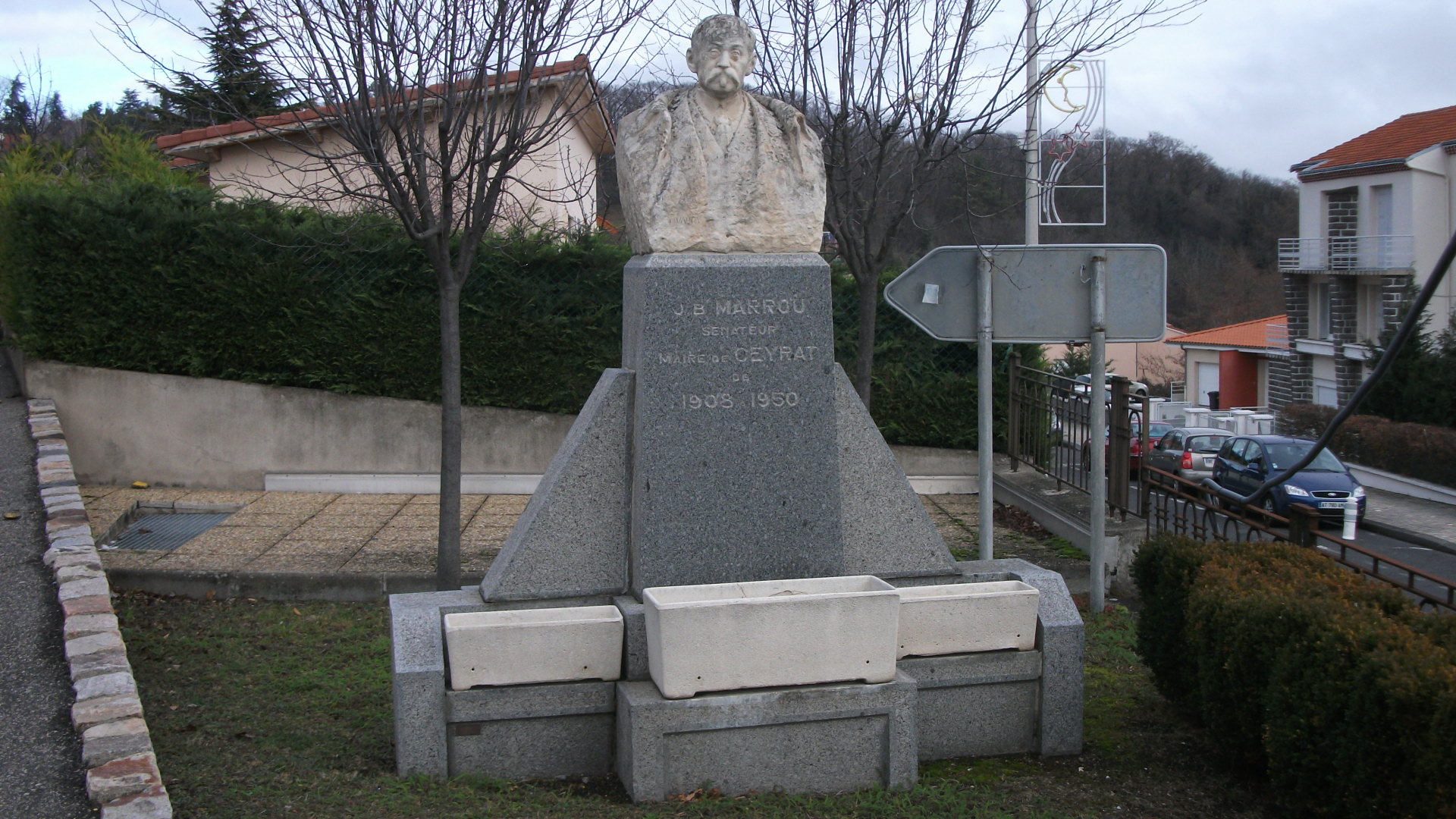 Le monument aux morts de Ceyrat